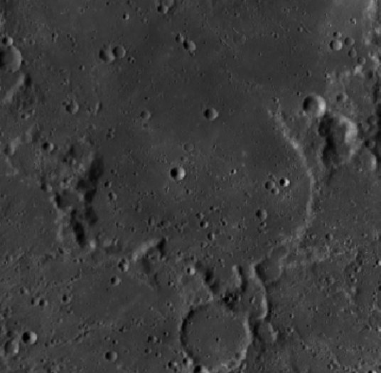 Cráter lunar Balmer. (Imagen LRO)